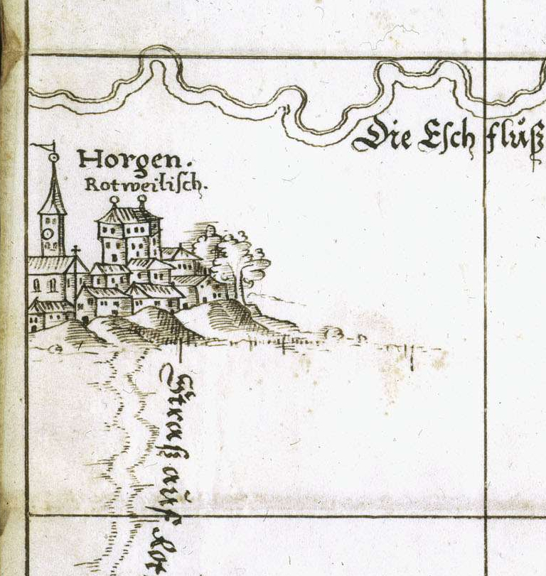 Württembergisch-rottweilische Grenze zwischen Flözlingen Rosenfelder Amts und dem rottweilischen Ort Horgen an der Eschach / Gadner und Zeitgenossen (1585)-bearbeitet